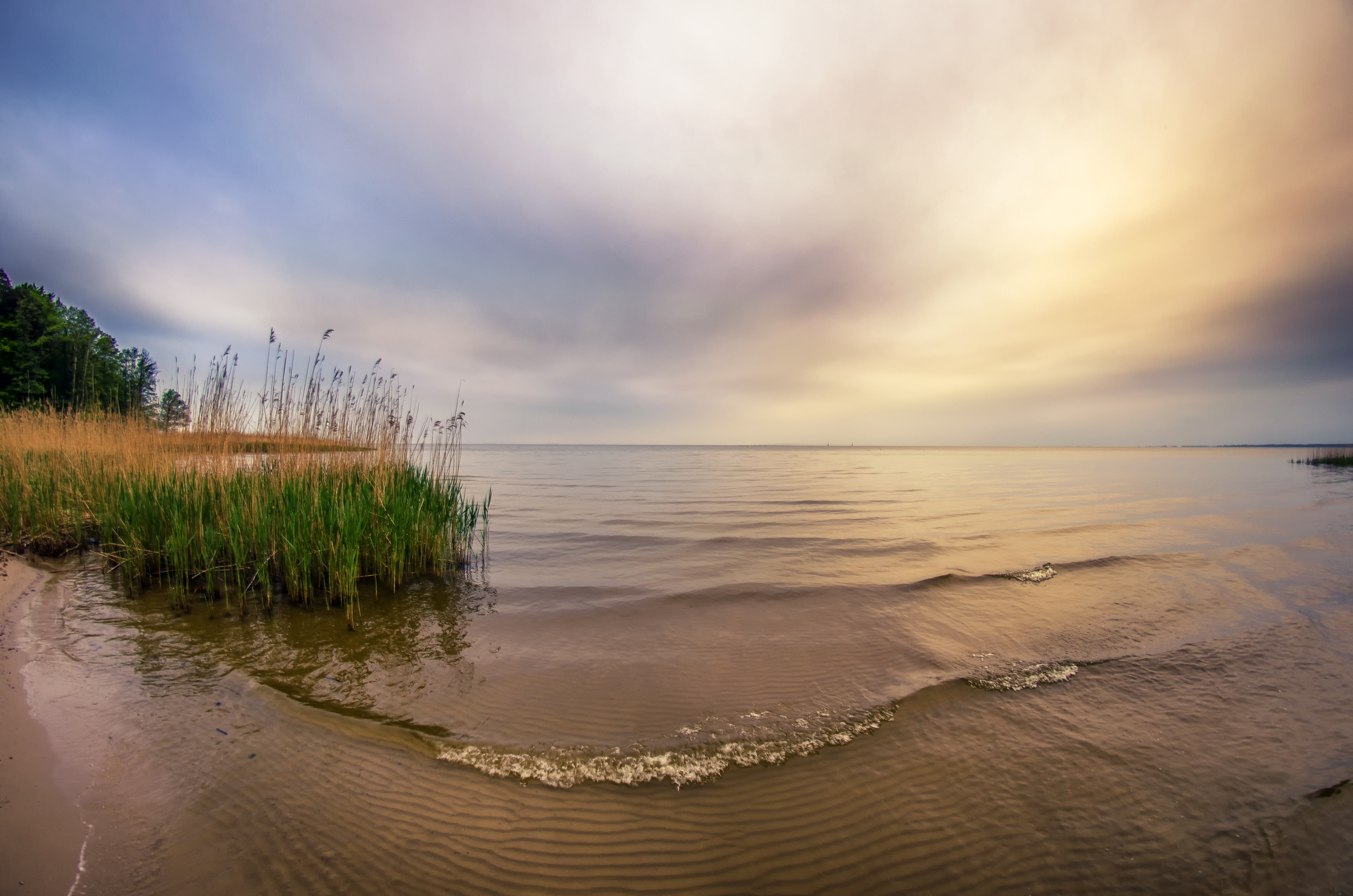 Obszar specjalnej ochrony ptaków Zalew Szczeciński. This is a photography of Natura 2000 protected area with ID PLB320009